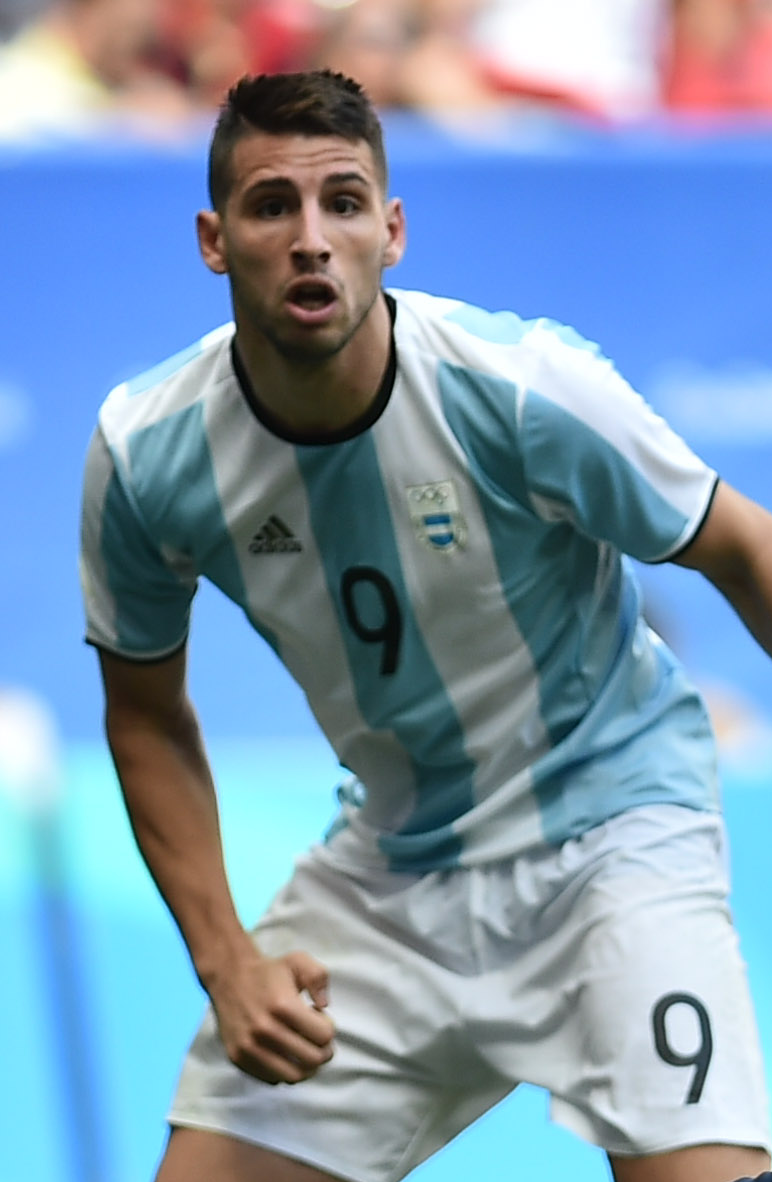 Estádio Nacional de Brasília Mané Garrincha, Brasília, DF, Brasil, 10/8/2016 Foto: Andre Borges/Agência Brasília Argentina e Honduras empataram por 1x1 nesta quarta-feira (10), no Estádio Mané Garrincha, em partida pelo grupo D do futebol masculino nas Olimpíadas 2016. O placar classificou Honduras para a próxima fase da competição e tirou a seleção argentina masculina da Olimpíada. Partido entre Argentina y Honduras por fase de grupos.